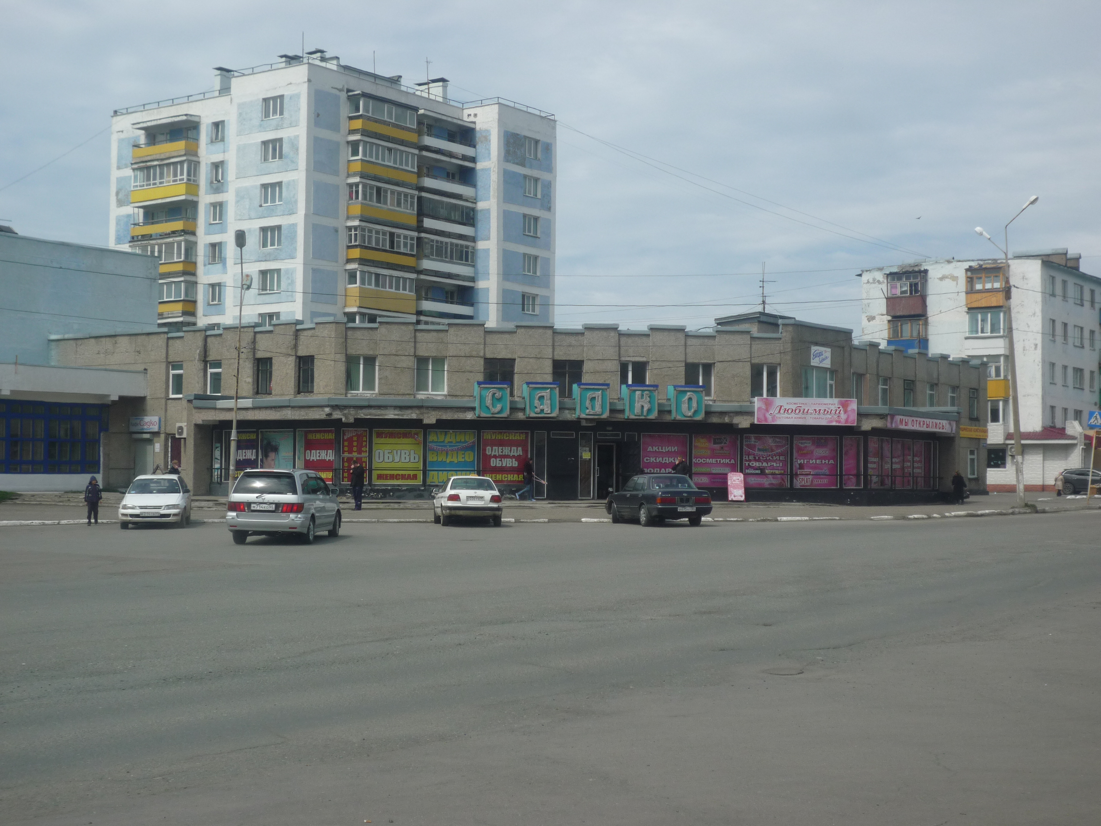 Девятиэтажка (Холмск)